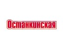 Ostankinskaya logo